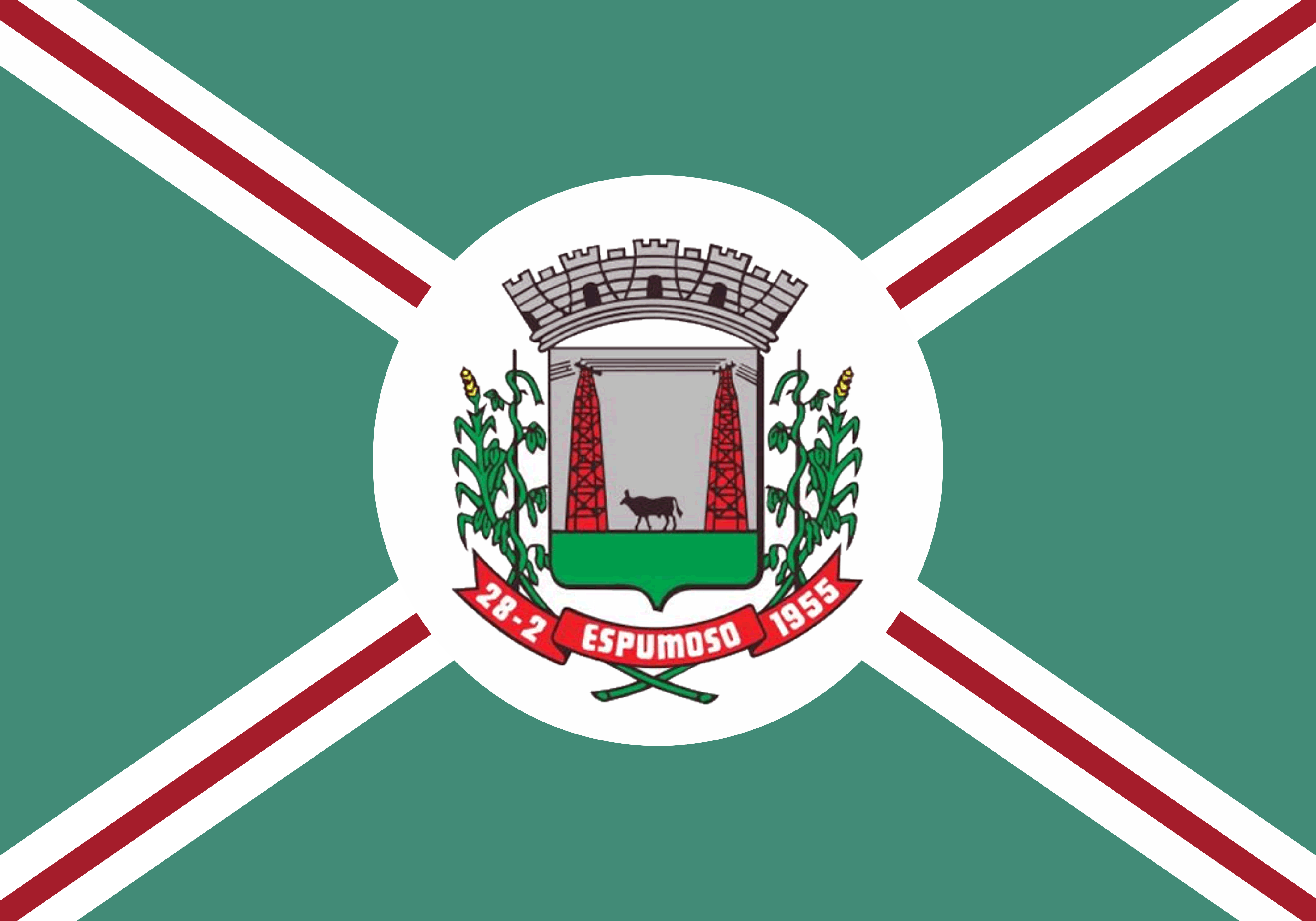 Bandeira do município de Espumoso - Rio Grande do Sul